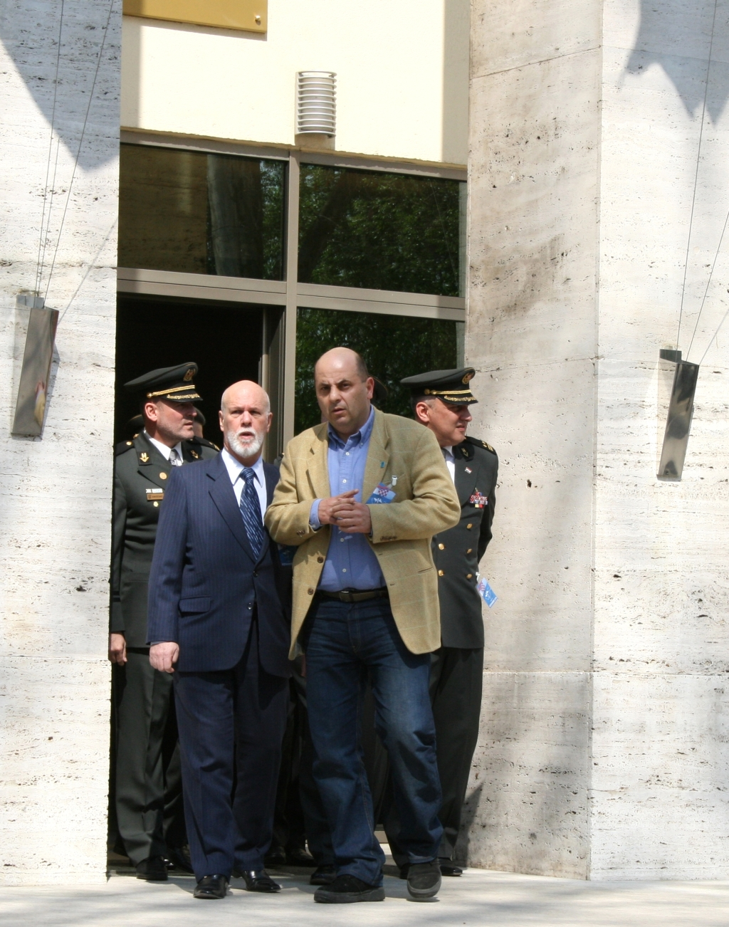 Svečanost podizanja NATO-ve zastave ispred zgrade MORH-a u Zagrebu. Na slici: Ivo Goldstein